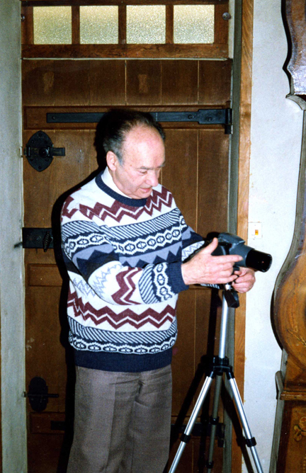 photographie representant pierre Monichon